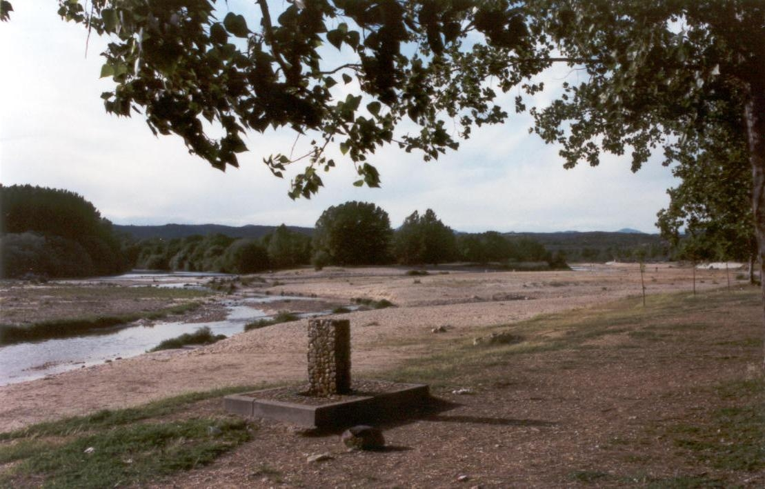 Río Alberche en Aldea del Fresno, confluencia con el río Perales Parque del río Alberche en Aldea del Fresno. Este es el lugar donde se produjo el codo de captura de dicho río. Procedente del oeste (a la izquierda en la foto), El Alberche, que fluía hacia la derecha (este) para desembocar en el Guadarrama se abrió paso hacia el sur formando un ángulo de 90º y dejando una amplia playa fluvial. Foto Fev. Septiembre 2002.